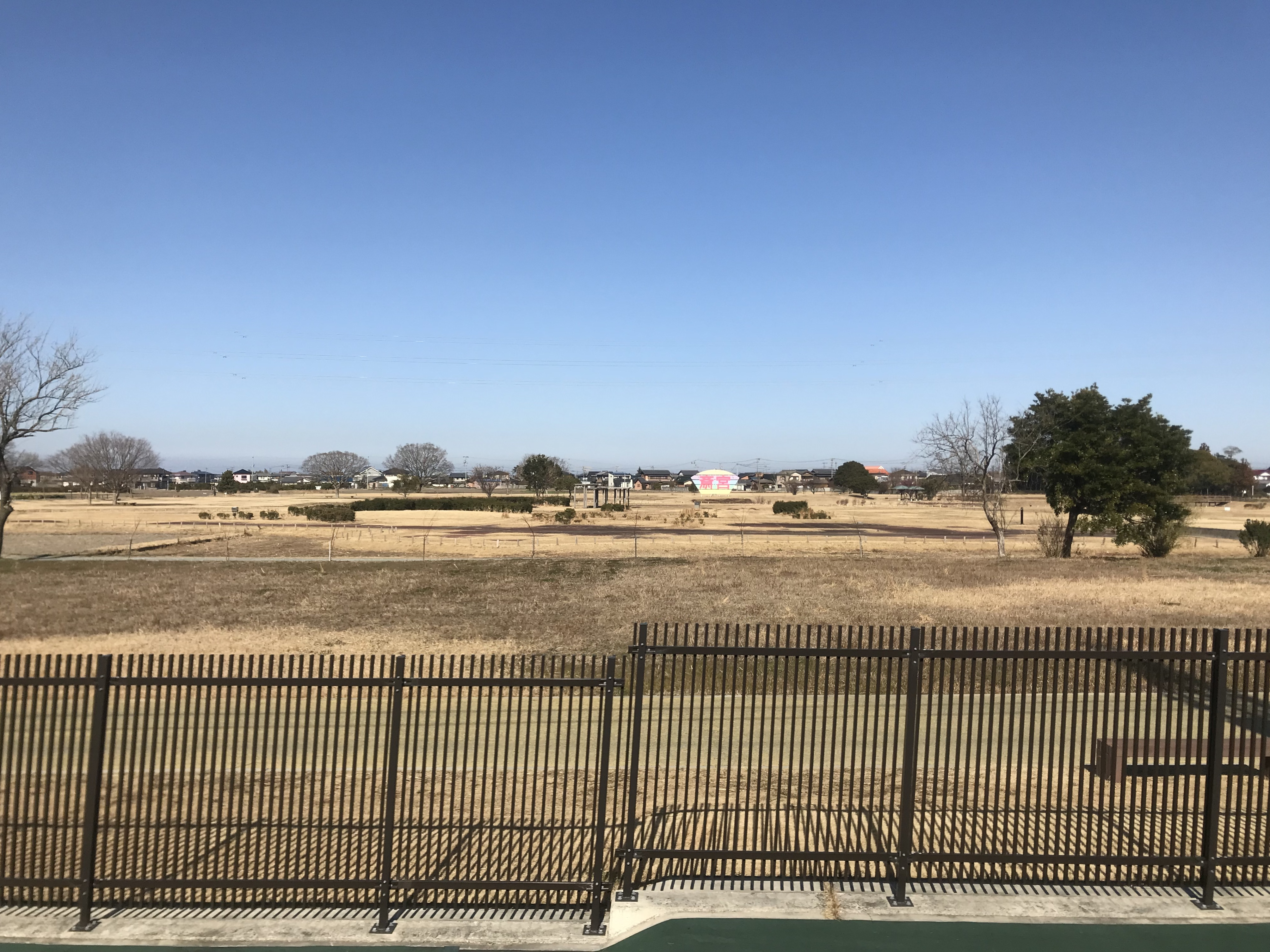 斎宮駅を通過する近鉄山田線の列車内より望む上園芝生広場